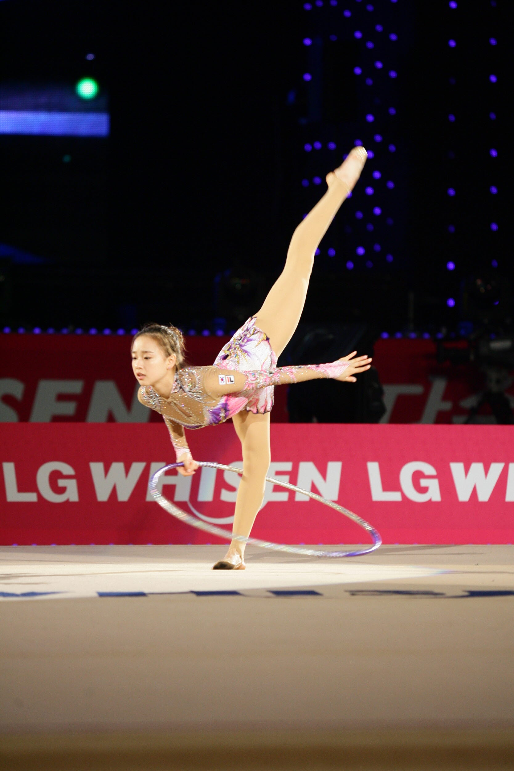 LG전자가 15일, 16일 이틀간 고양체육관에서 국내 유일의 리듬체조 갈라쇼인 ‘LG 휘센 리드믹 올 스타즈 2013(LG WHISEN Rhythmic All Stars 2013)’ 행사를 개최했다.